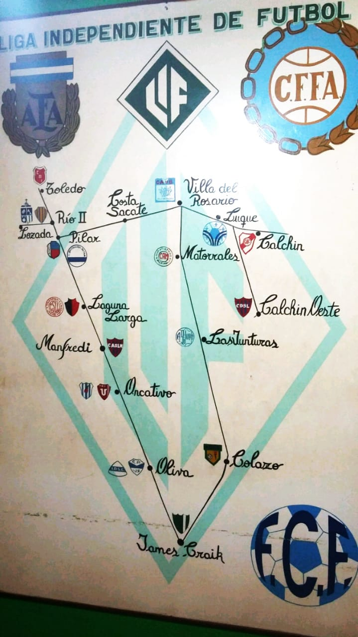 Cuadro ubicado en la entrada de la Casa de la Liga.